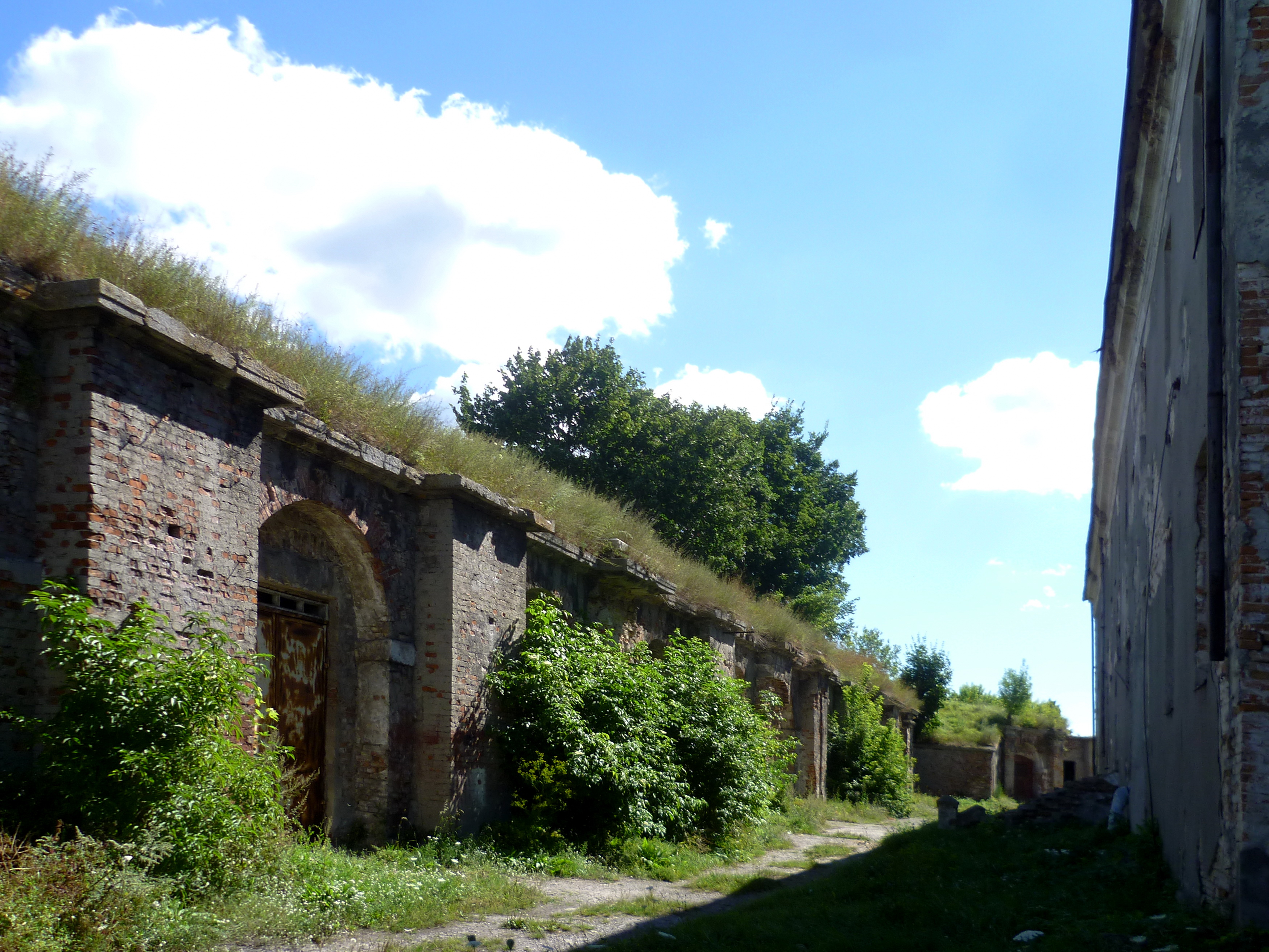 Вали і бастіони з казематами (1630-1635 рр.) - вигляд позаду палацу - м.Броди (вул.Шкільна, 13) Львівська область Україна